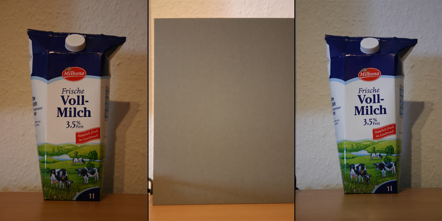 Manueller Weißabgleich in 3 Schritten